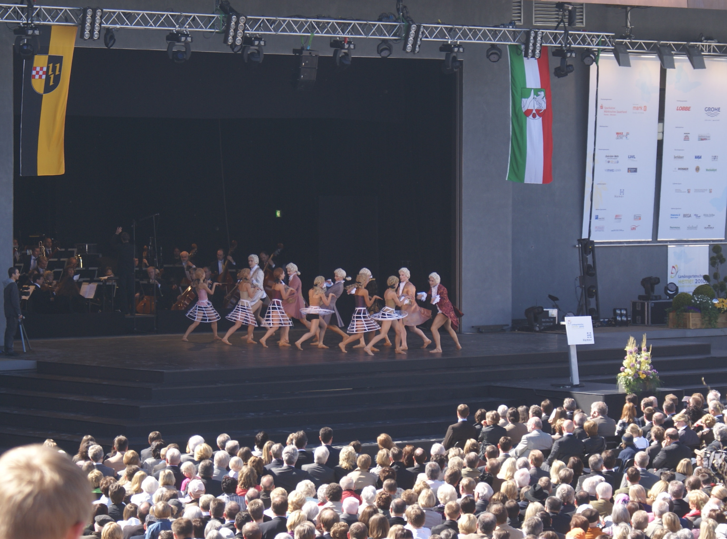 Ballett-Vorführung beim Festakt zur Eröffnung der Landesgartenschau Hemer